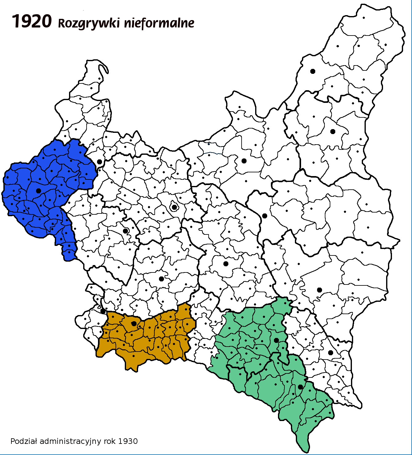 1920 rozgrywkinieoficjalne